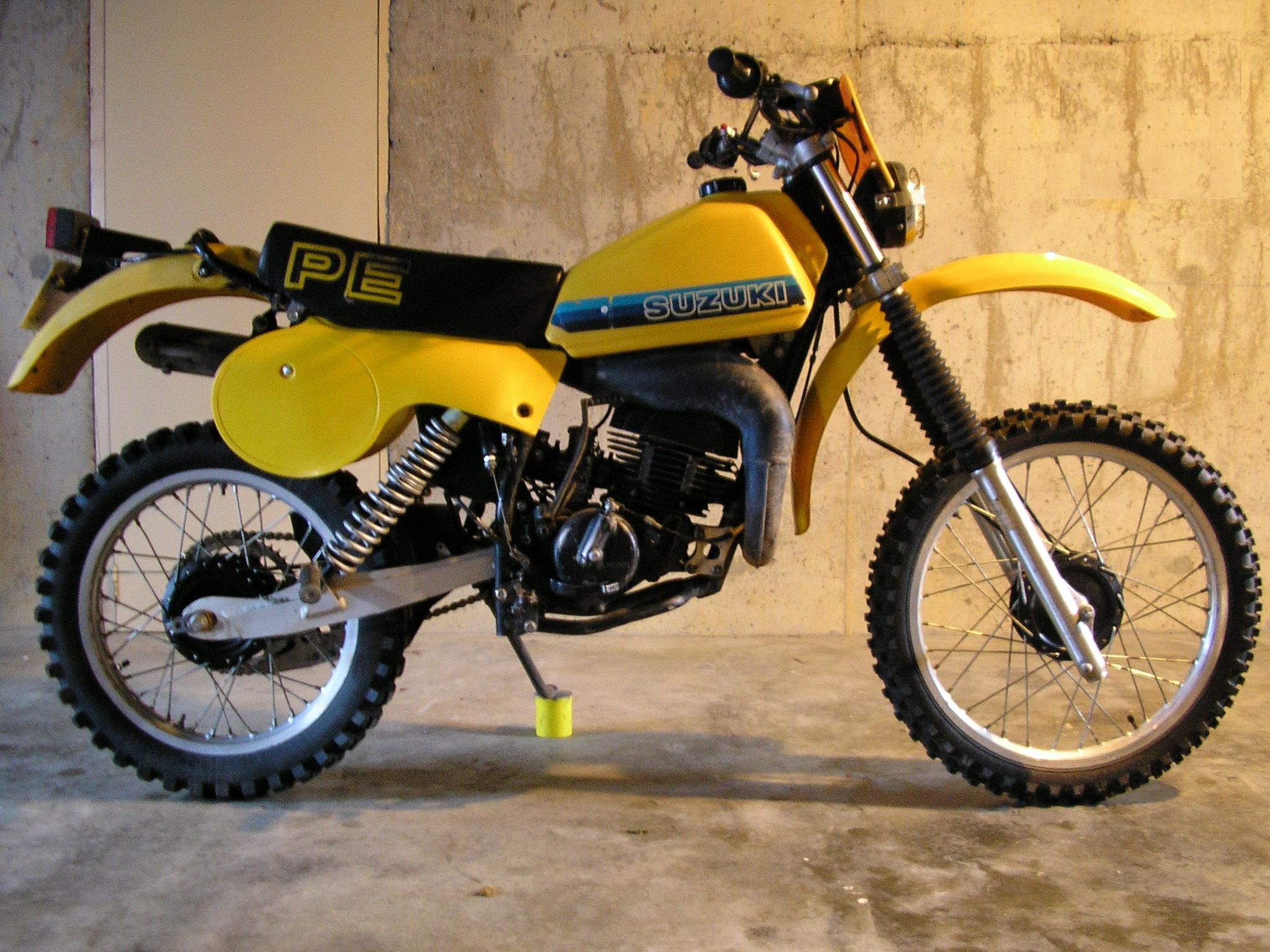 La Suzuki PE 175 X de 1981. Le modèle présenté est entièrement d'origine, il lui manque juste un autocollant sur le cache latéral ainsi que ses outils fixés en haut du tube de fourche droit et maintenus par un anneau de caoutchouc. Il s'agit d'un modèle Français.